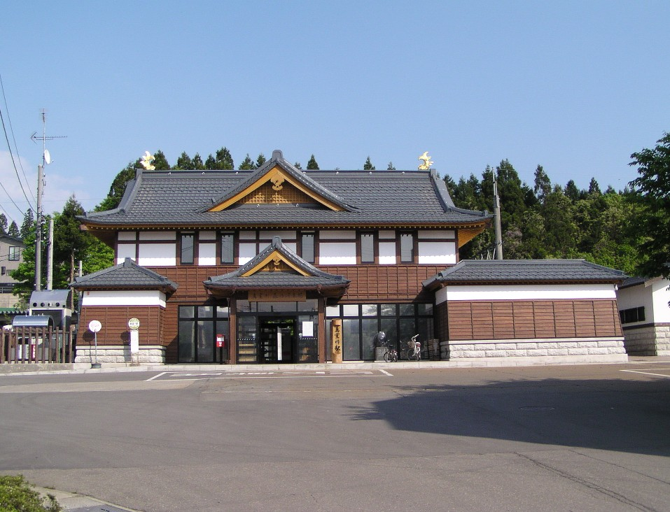 Mamurogawa Station, Mamurogawa, Yamagata, Japan